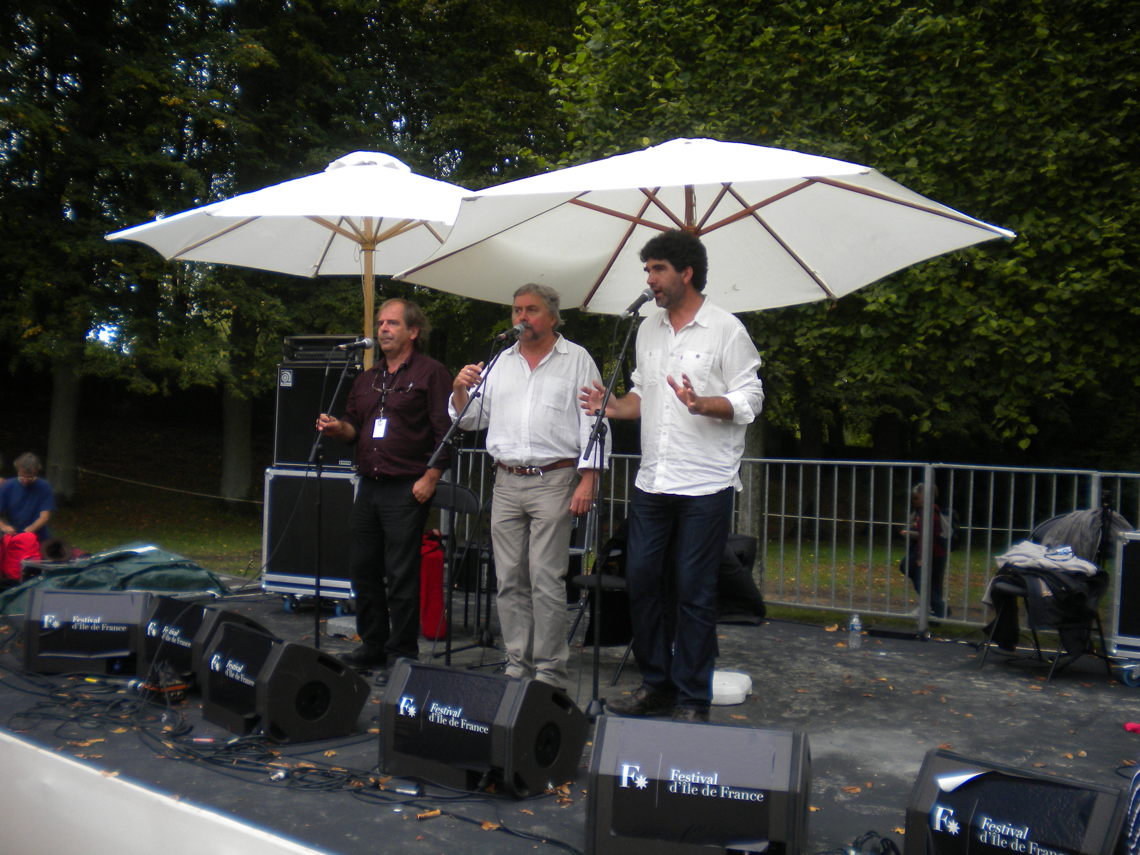 Brou HamonQuimbert 2011 09 04 Villarceaux